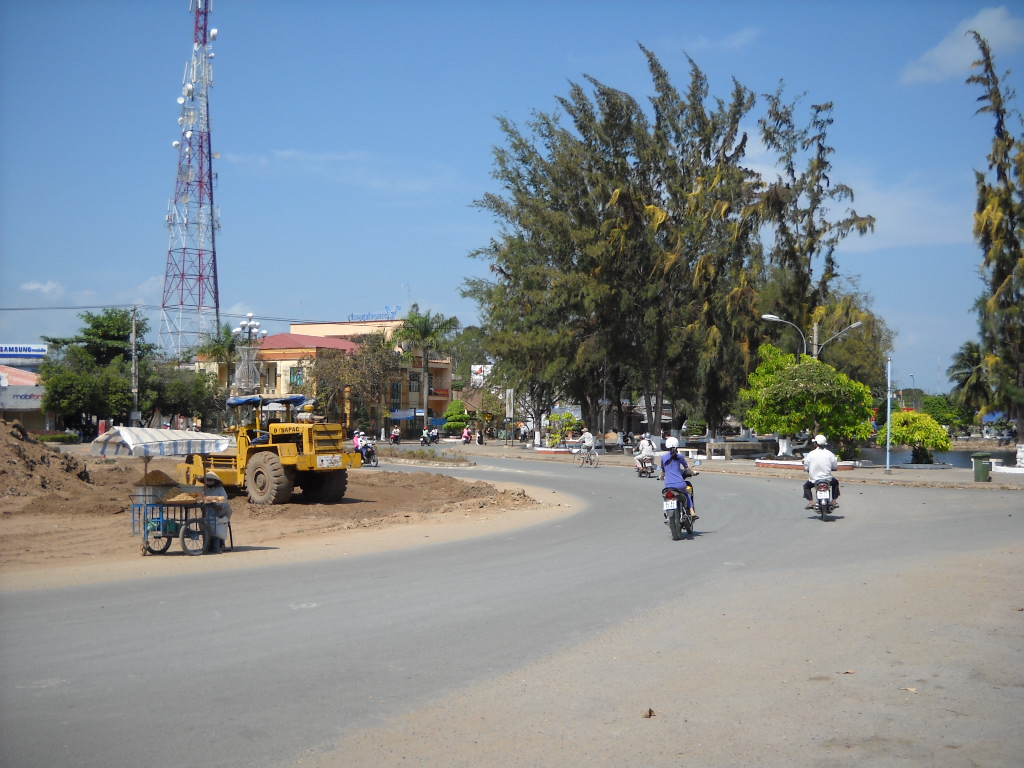 Thể loại:Xã Thể loại:Thị trấn Việt Nam